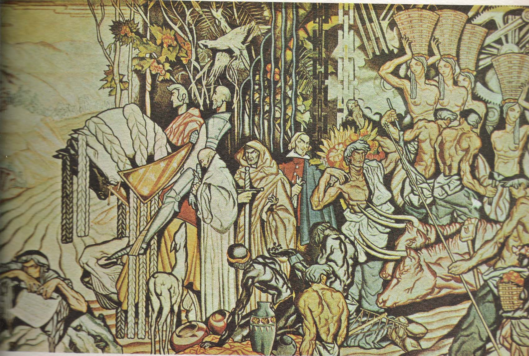 Mural hecho para la Feria Internacional de Chicago, propiedad del Logan Foundation posted by Pablo Gehr